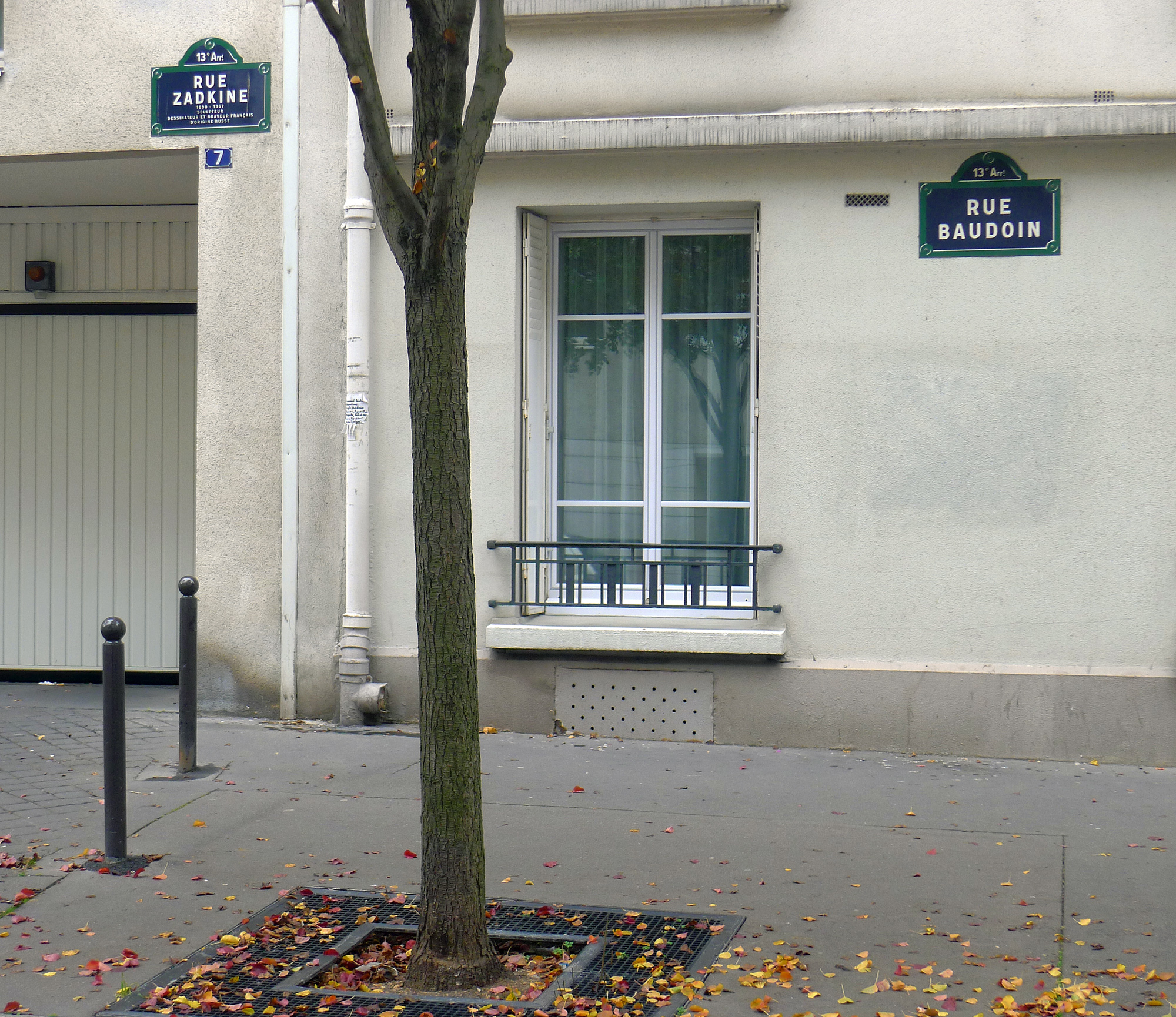 Rue Zadkine et rue Baudouin - Paris XIII